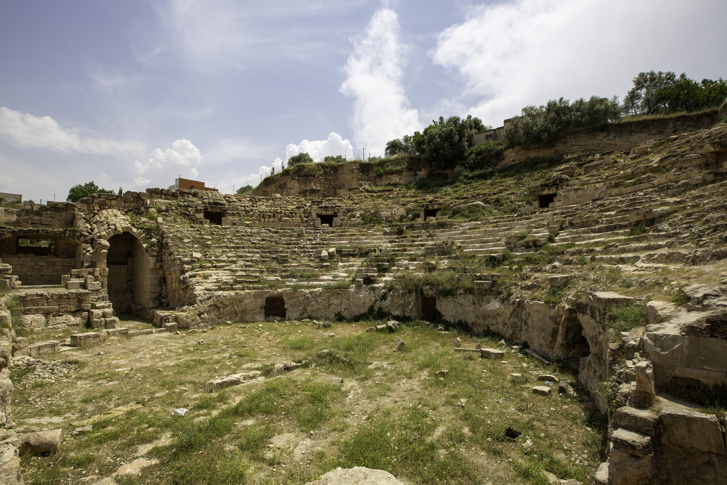 Capitolias (Beit Ras)